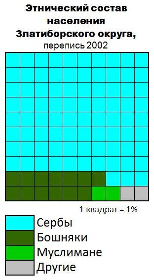 Этнический состав населения Златиборского округа (Сербия)